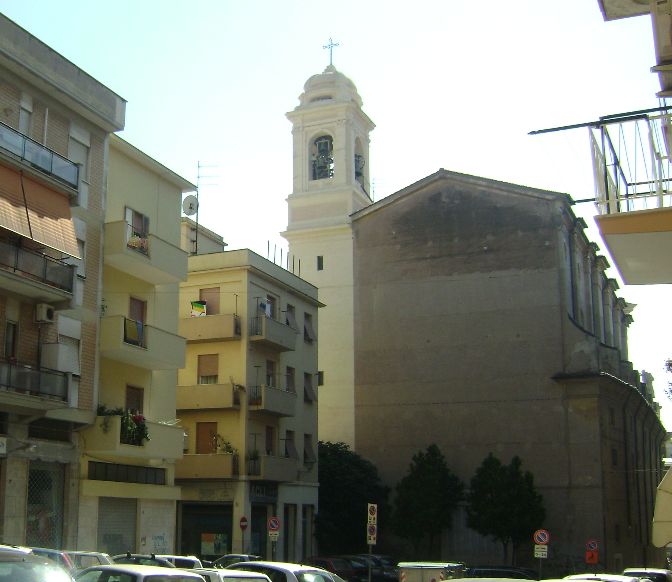 il campanile della cattedrale di civitavecchia